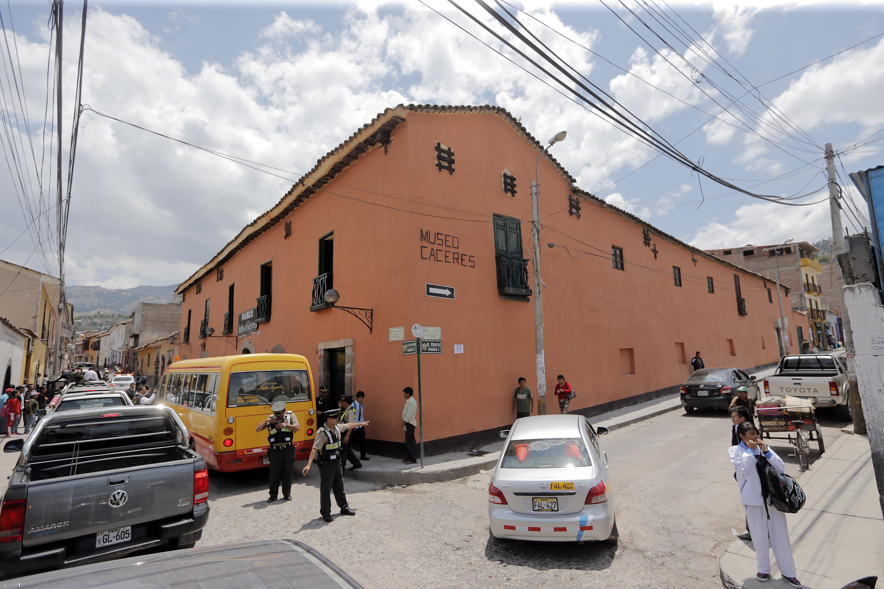 El ministro de Defensa, Pedro Cateriano Bellido, preside la ceremonia de presentación del libro "Cáceres" en la ciudad de Huamanga.